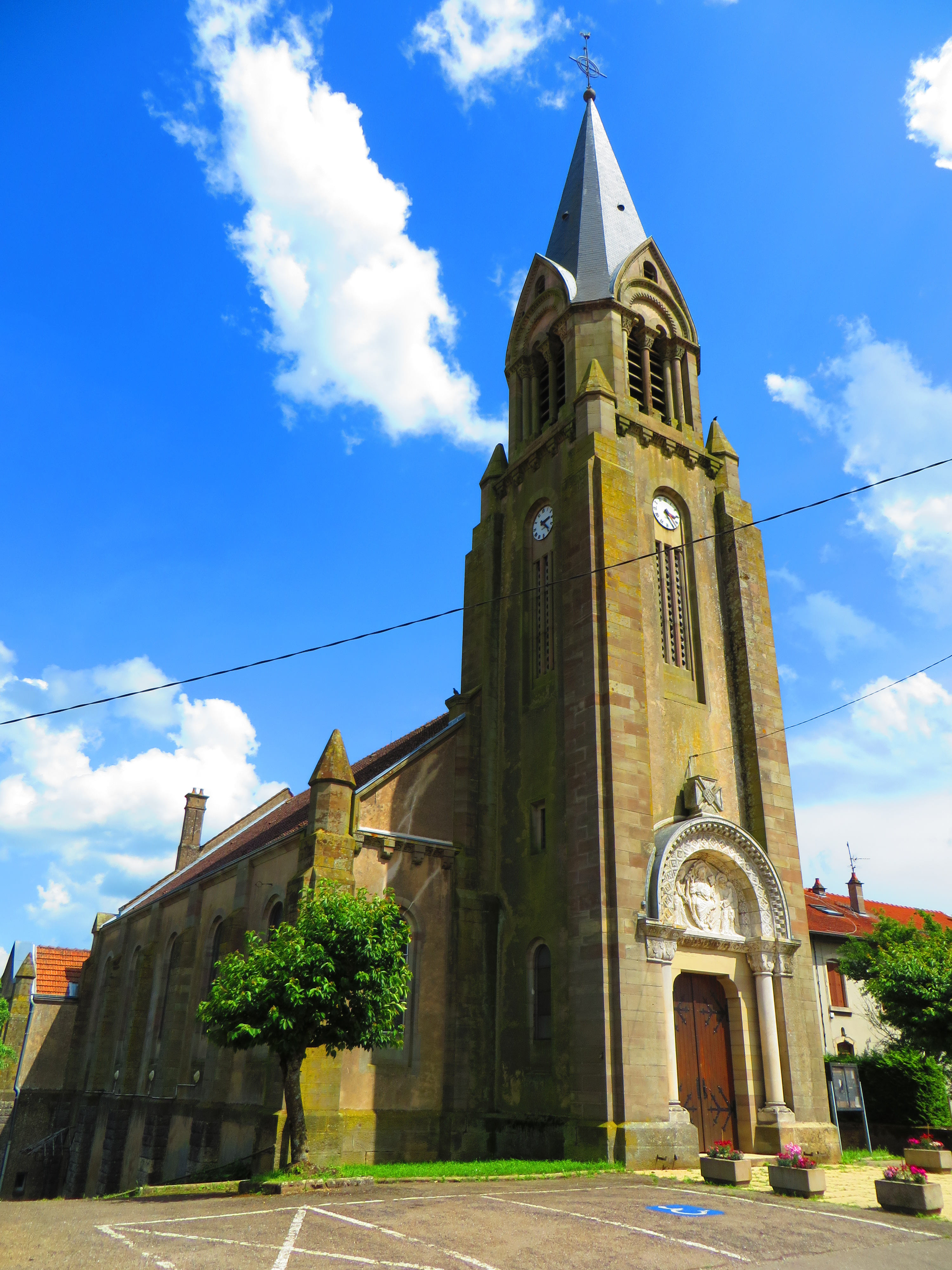 Bouxières-aux-Chênes Église Sainte-Madeleine